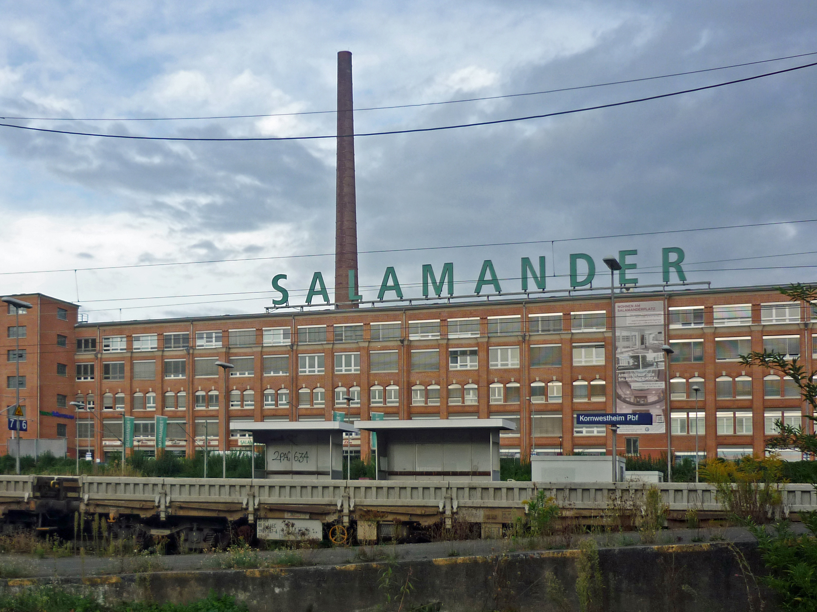 Ehem. Salamanderwerke in Kornwestheim